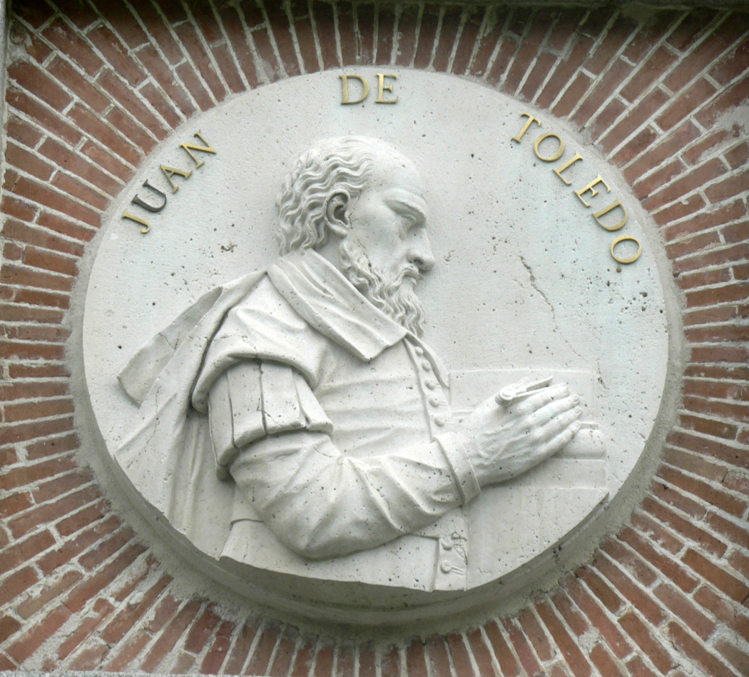 El pintor español Juan de Toledo (Lorca?, 1618-Madrid, 1665). Medallón incrustado en la fachada del Museo del ,Prado, Madrid.